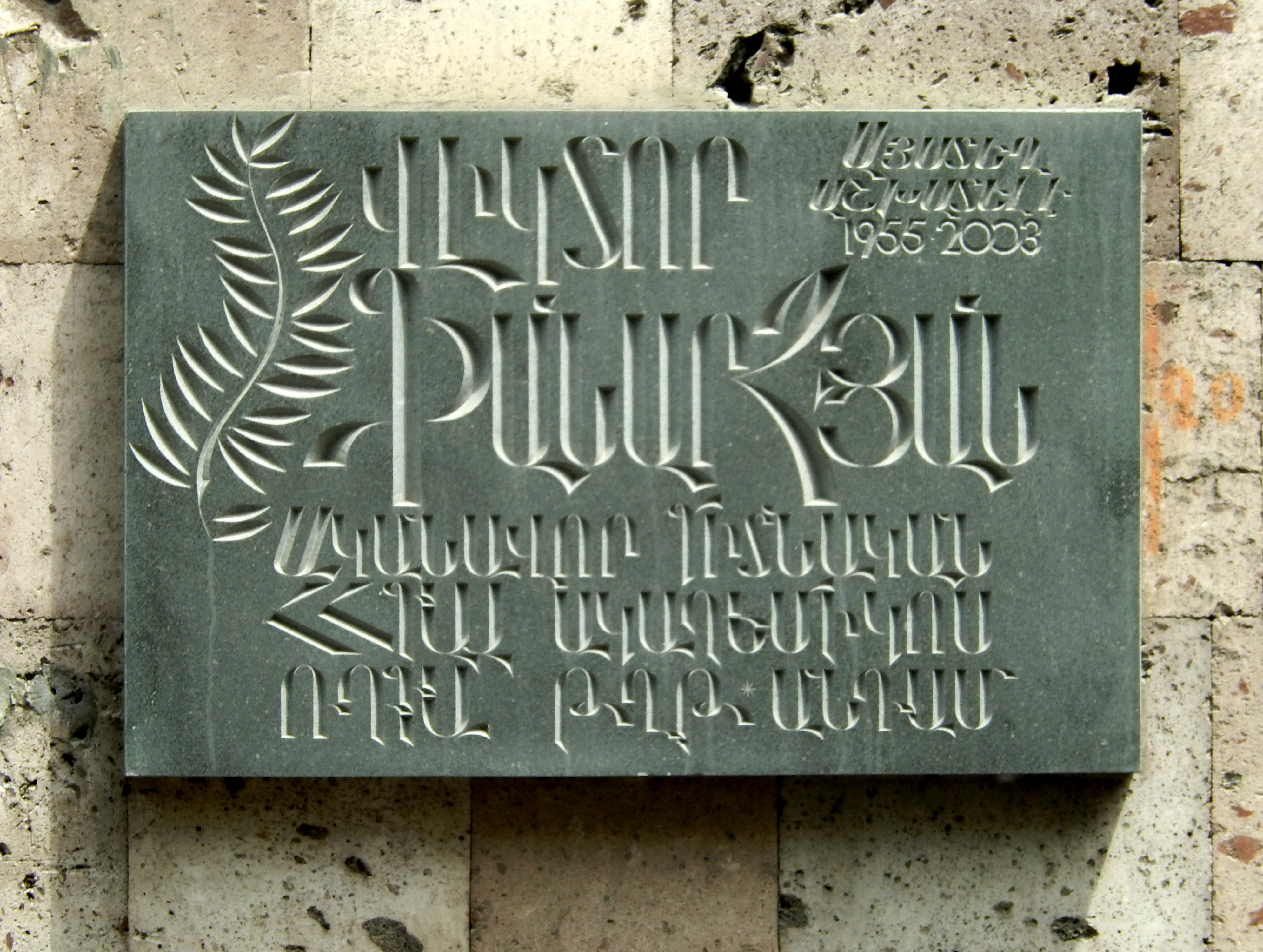 Վիկտոր Ֆանարջյանի հուշատախտակը Լևոն Օրբելու անվան ֆիզիոլոգիայի ինստիտուտի պատին